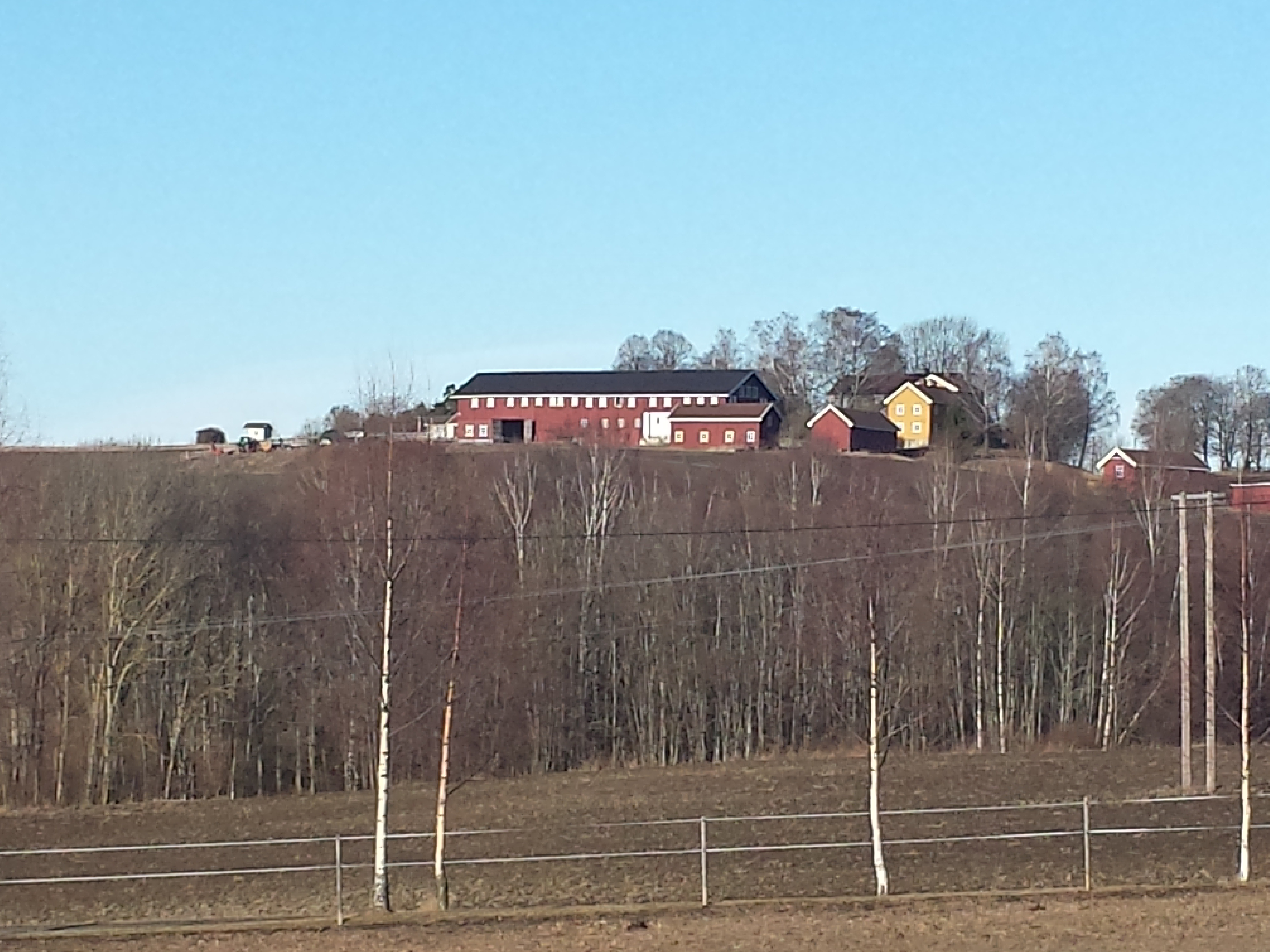 Hesleberg eller Hesselberg er en gammel storgård som ligger i Norderhov